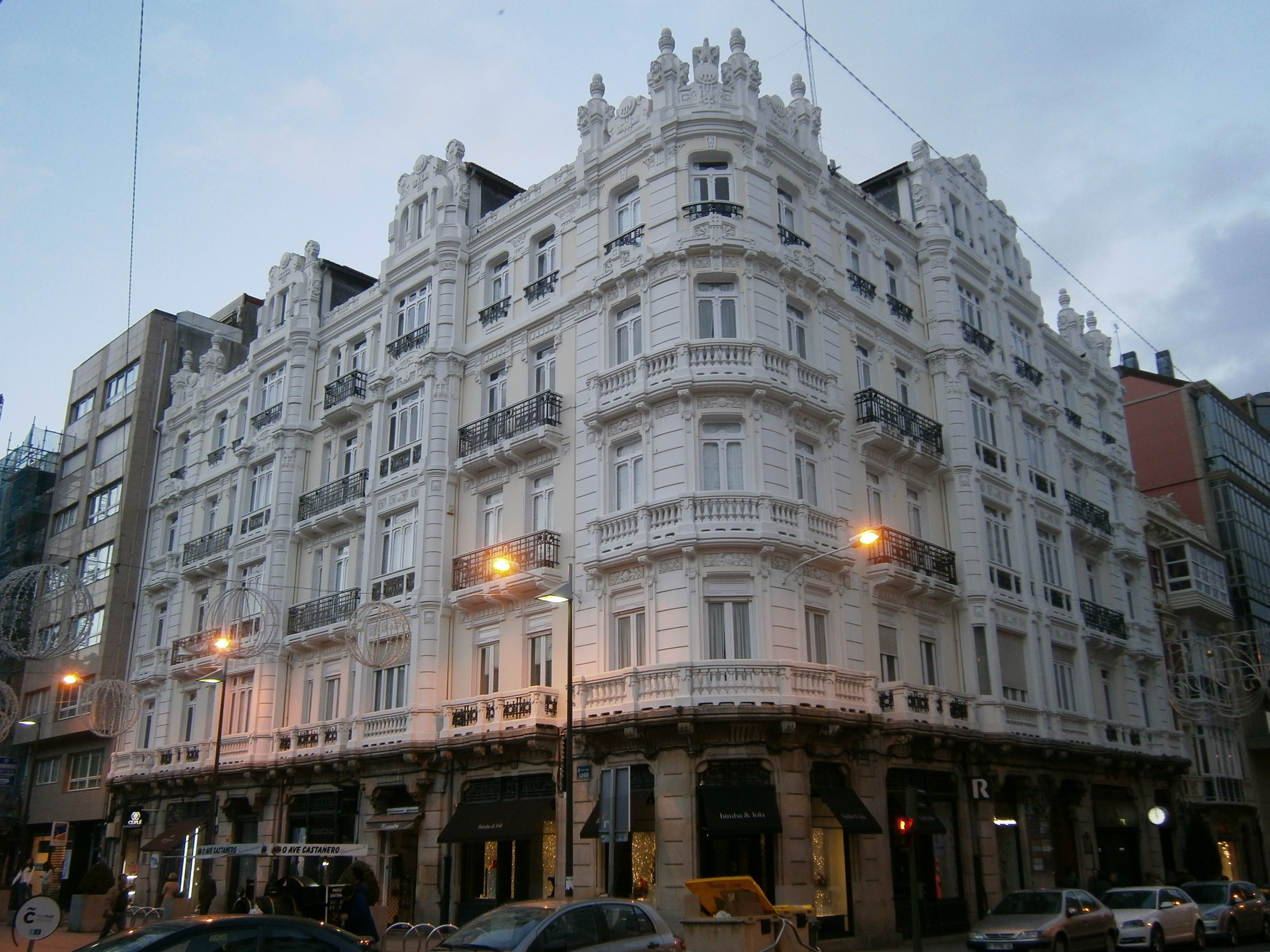 Casa Viturro, de Julio Galán Carvajal, na Coruña